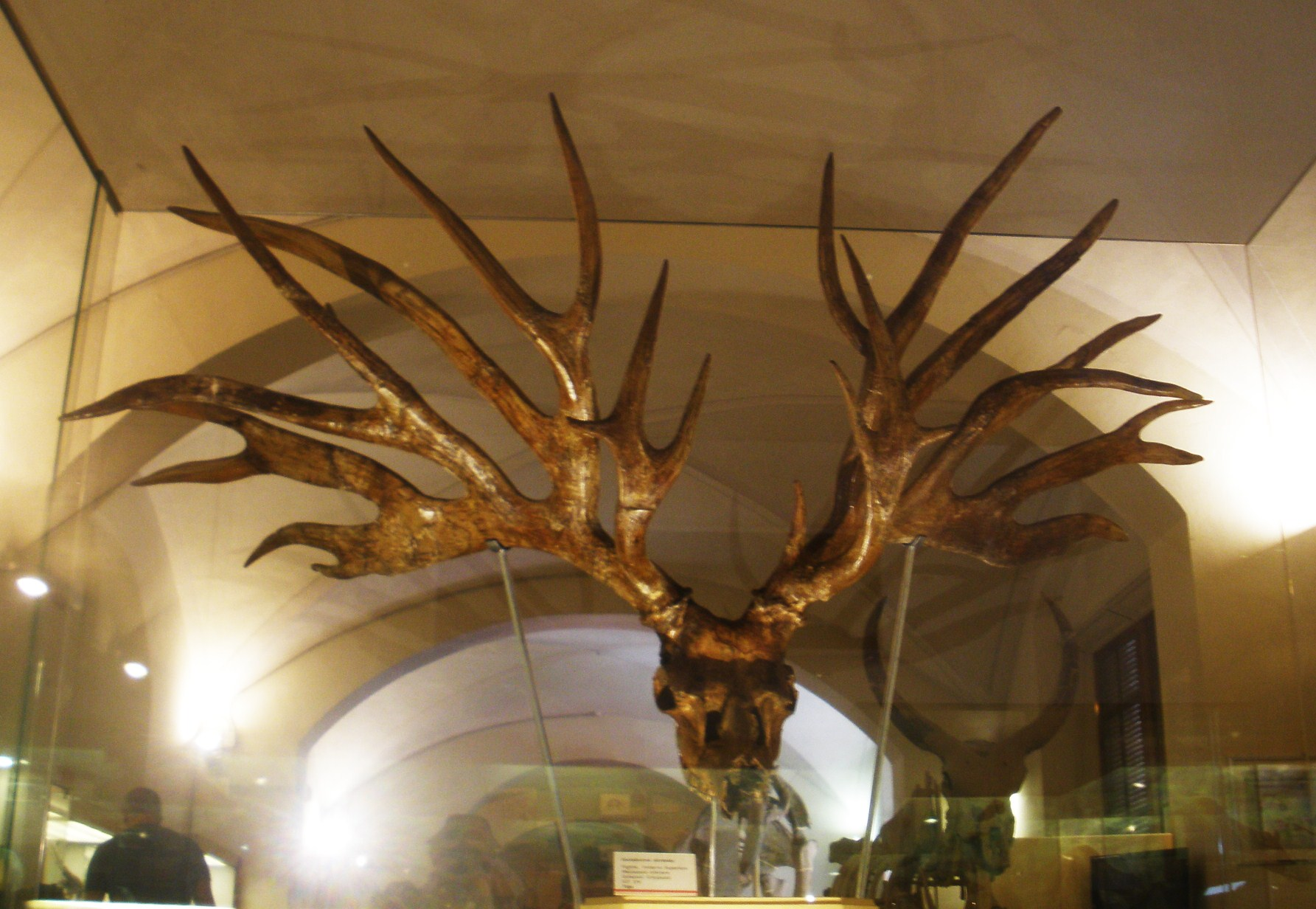 Fossil of Eucladoceros, an extinct mammal - Took the picture at Museo di Paleontologia di Firenze